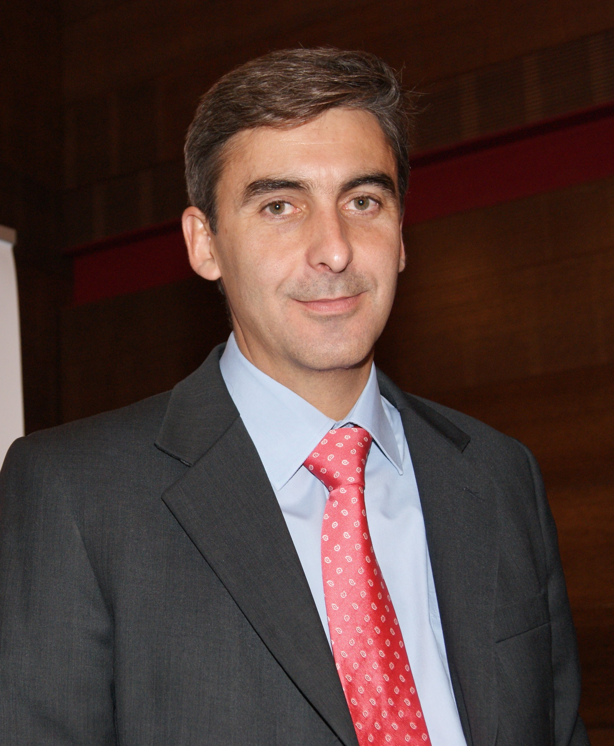 David Ortega, jurista y profesor español.